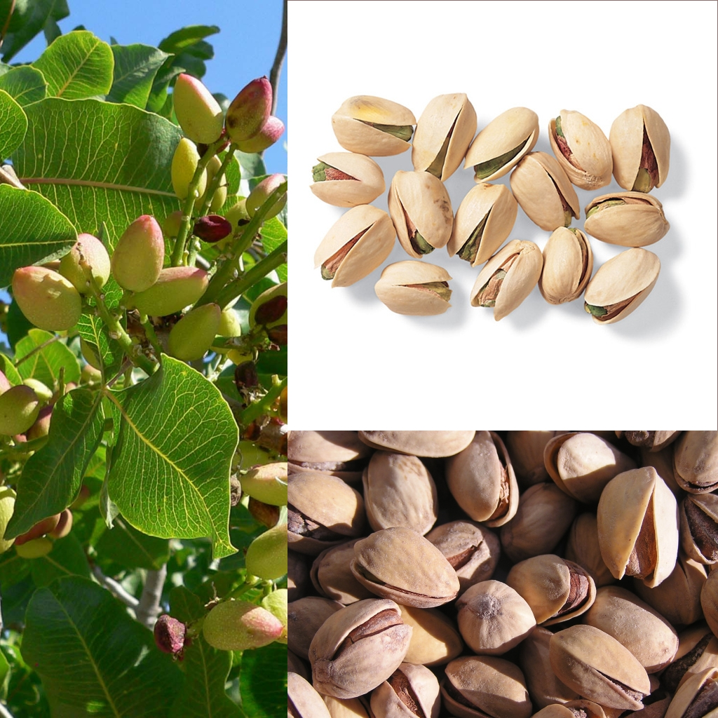 Grafika podręcznika Wikijunior:Owoce. Orzeszki pistacjowe, pistacje; pistacja właściwa (Pistacia vera).